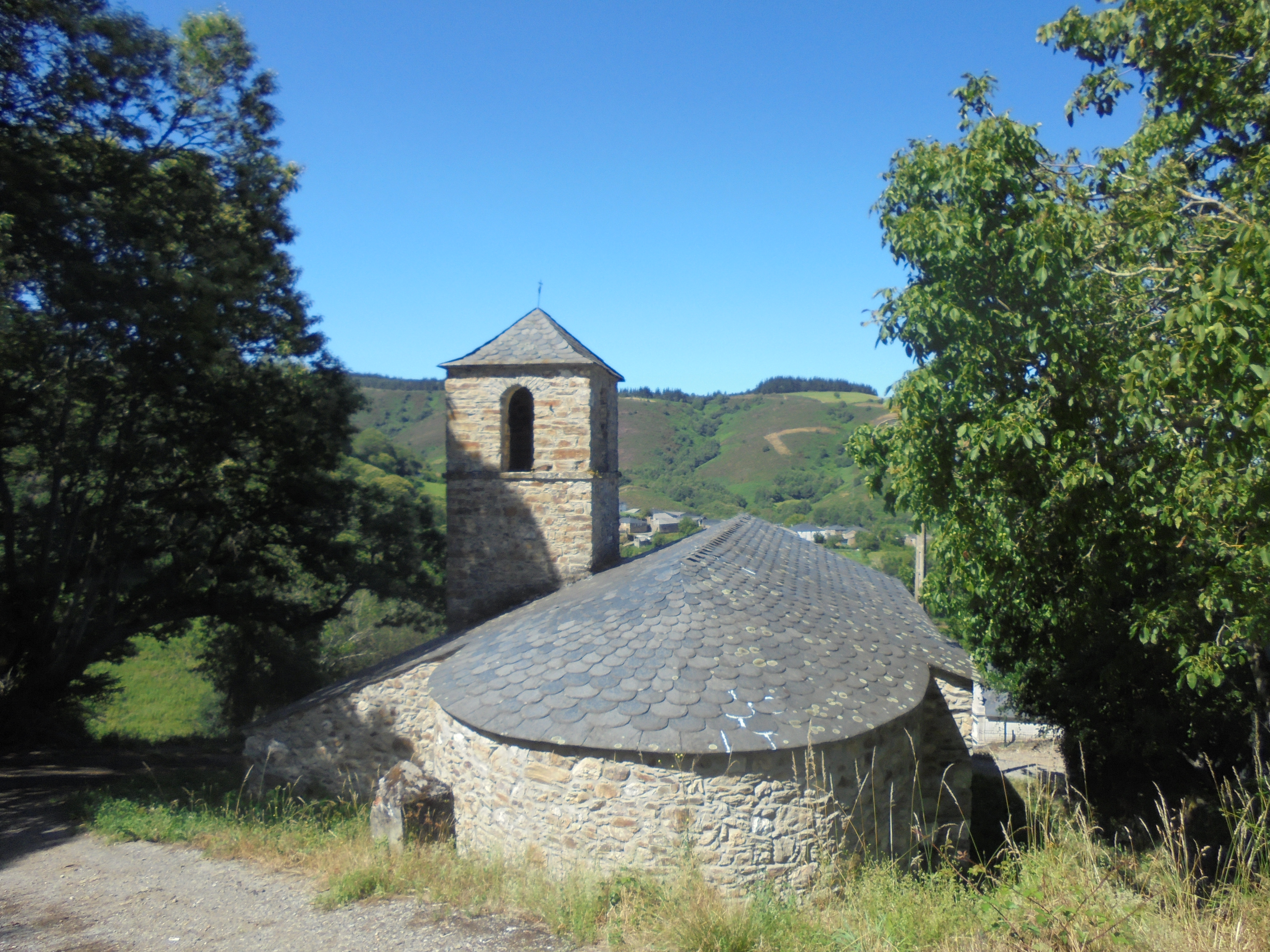 Igrexa de San Xoán de Lexo